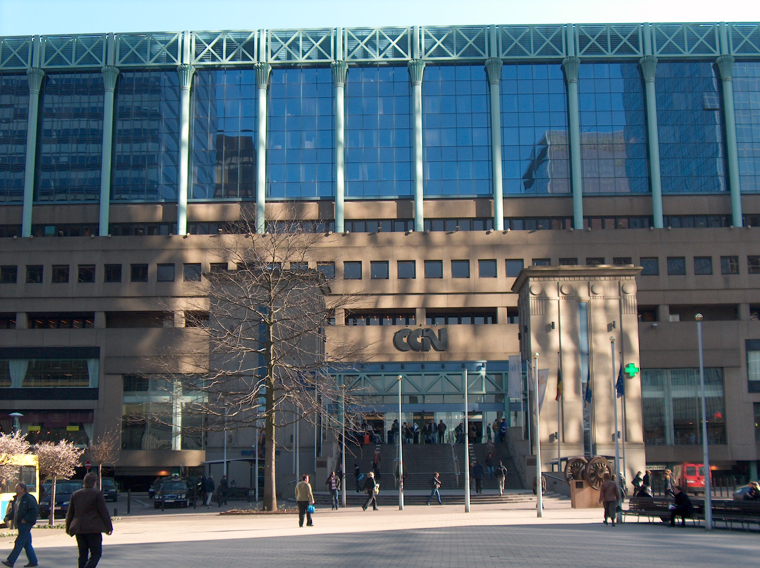 Le Centre de Communication Nord (CCN) à la Gare du Nord de Bruxelles (Belgique).